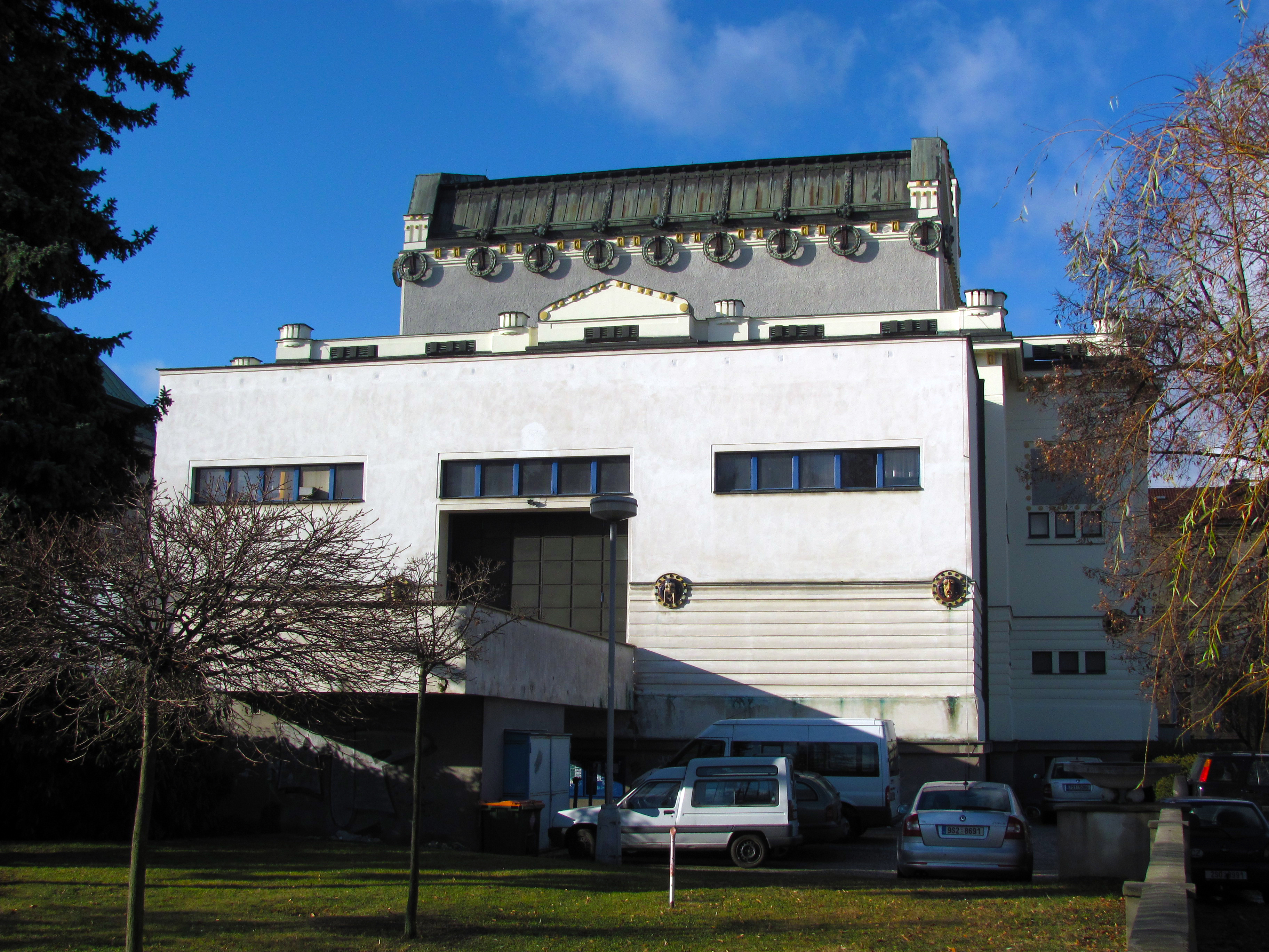 Zadní pohled na budovu Městského divadla Mladá Boleslav (přístavba z 30. let 20. století)